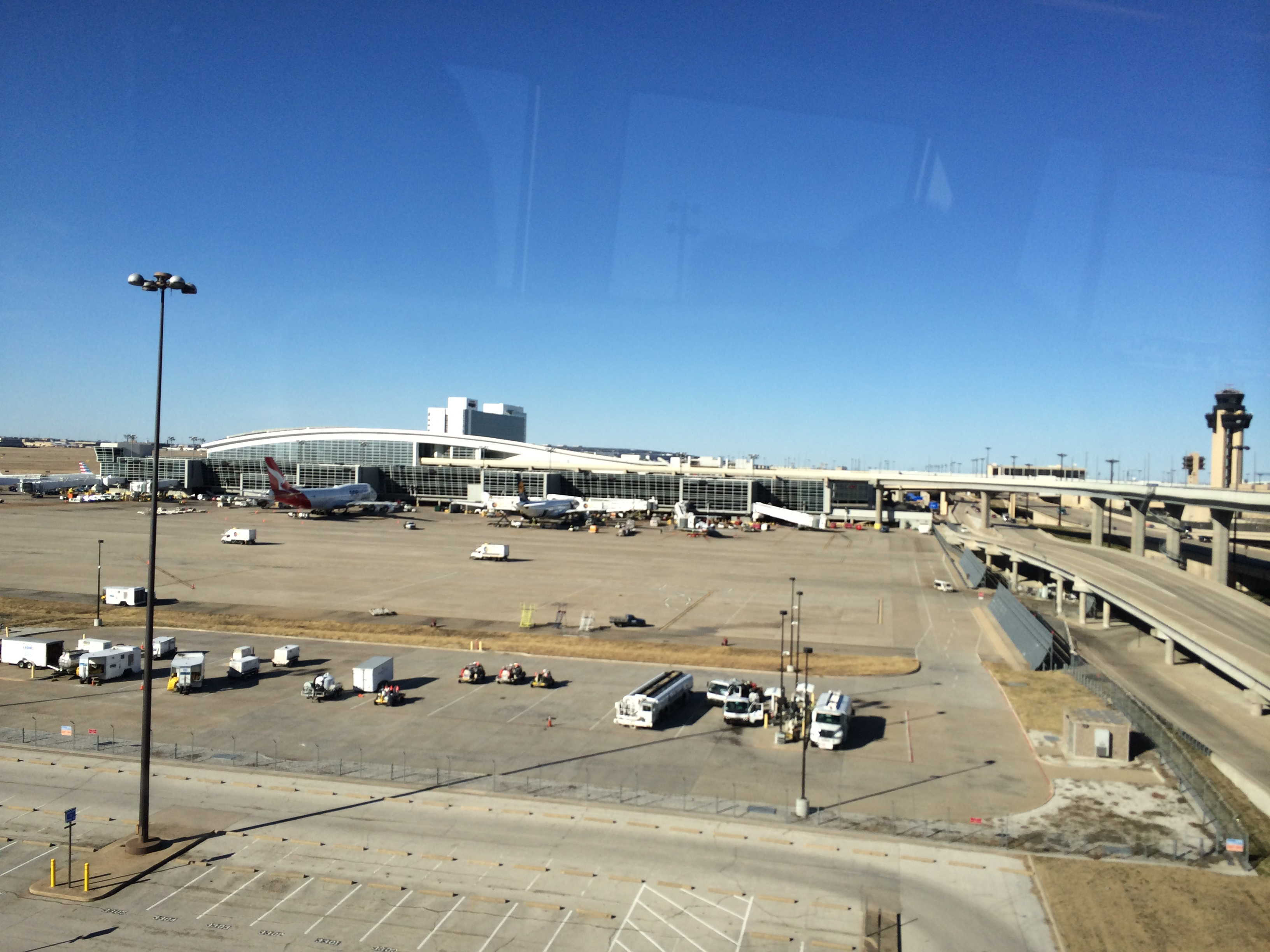 Terminal D del aeropuerto de DFW.